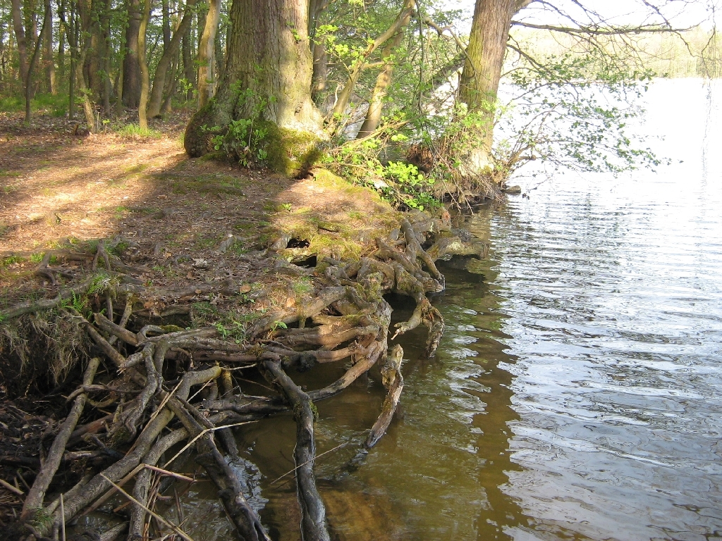 Caputher See, Uferbereich (Gemeinde Schwielowsee, Brandenburg).